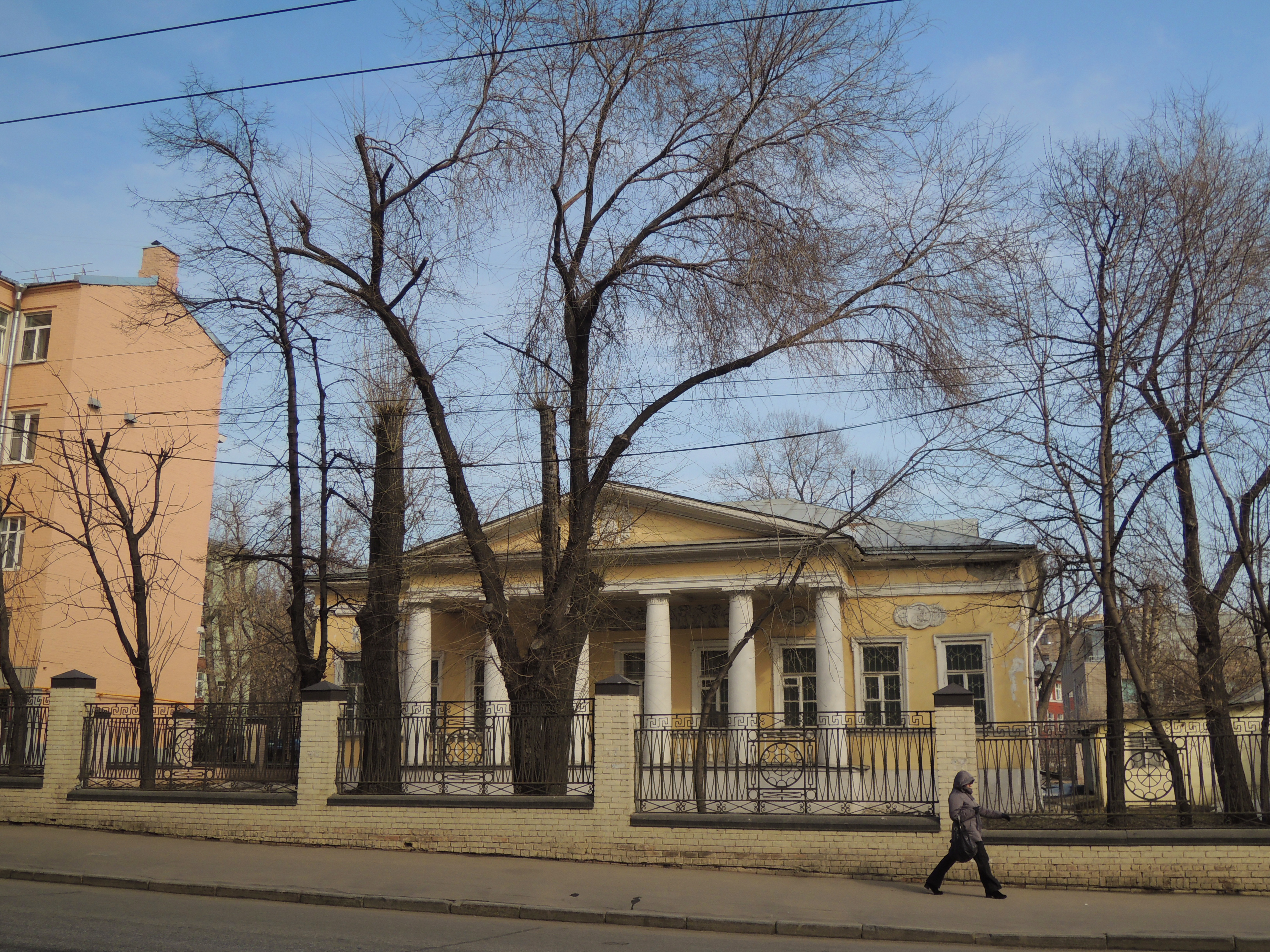 Остоженка. № 49, дом А. В. Всеволожского. Здание, построенное между 1817-м и 1825 годами, являлось частью городской усадьба Лошаковского-Всеволожского. Здесь жили Михаил Бакунин и братья Киреевские.